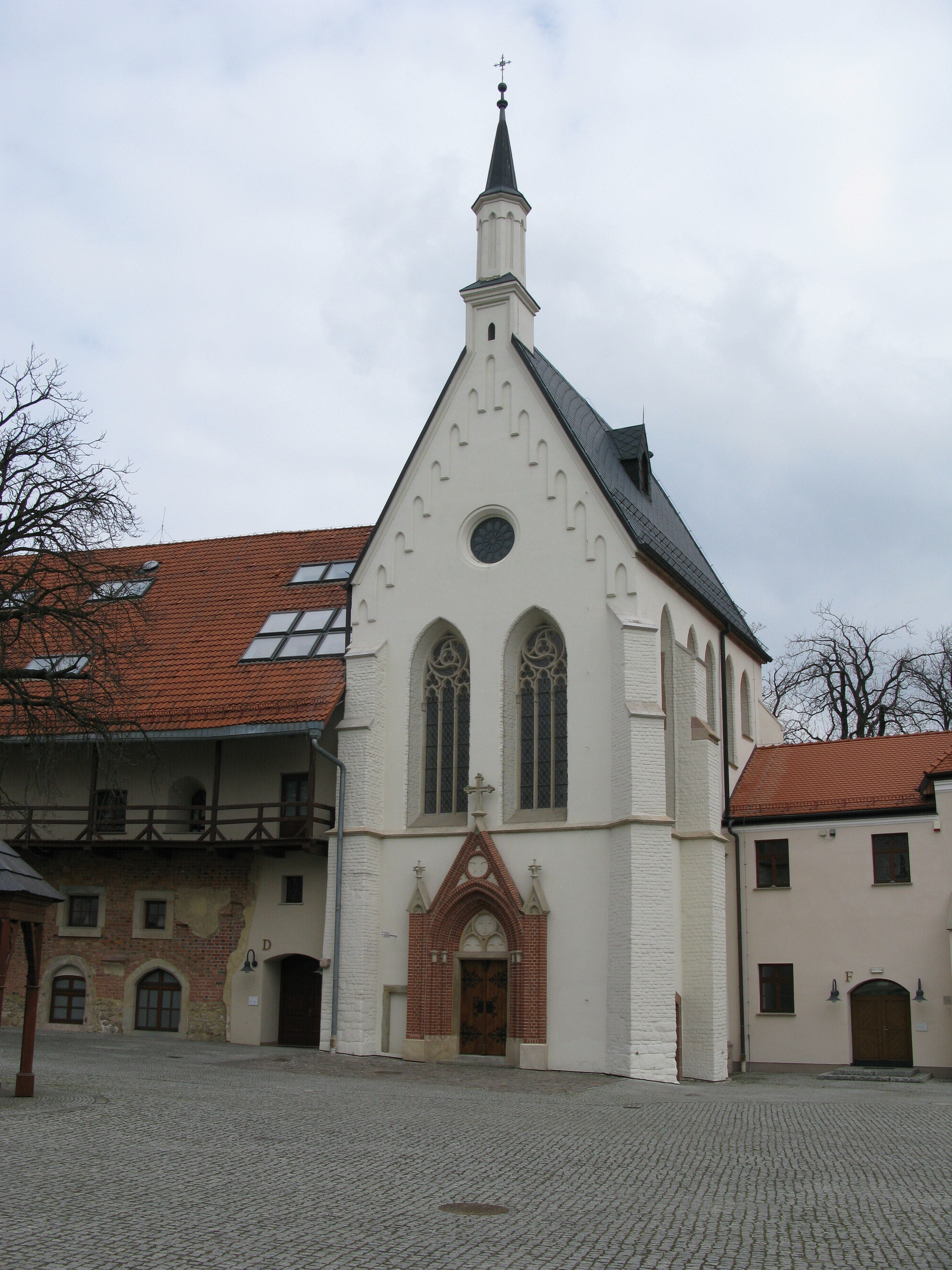 Zámecká kaple sv.Tomáše z Canterbury, Ratiboř, Polsko